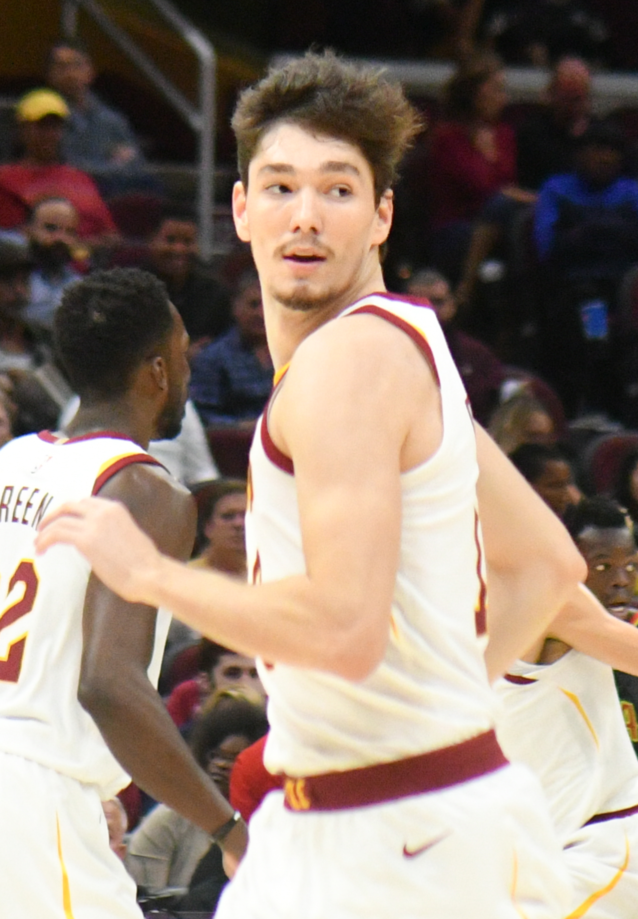 Cedi Osman